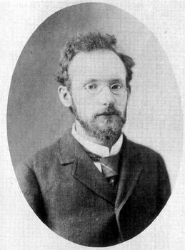 Вячеслав Иванов (1866 - 1949) около 1900 года